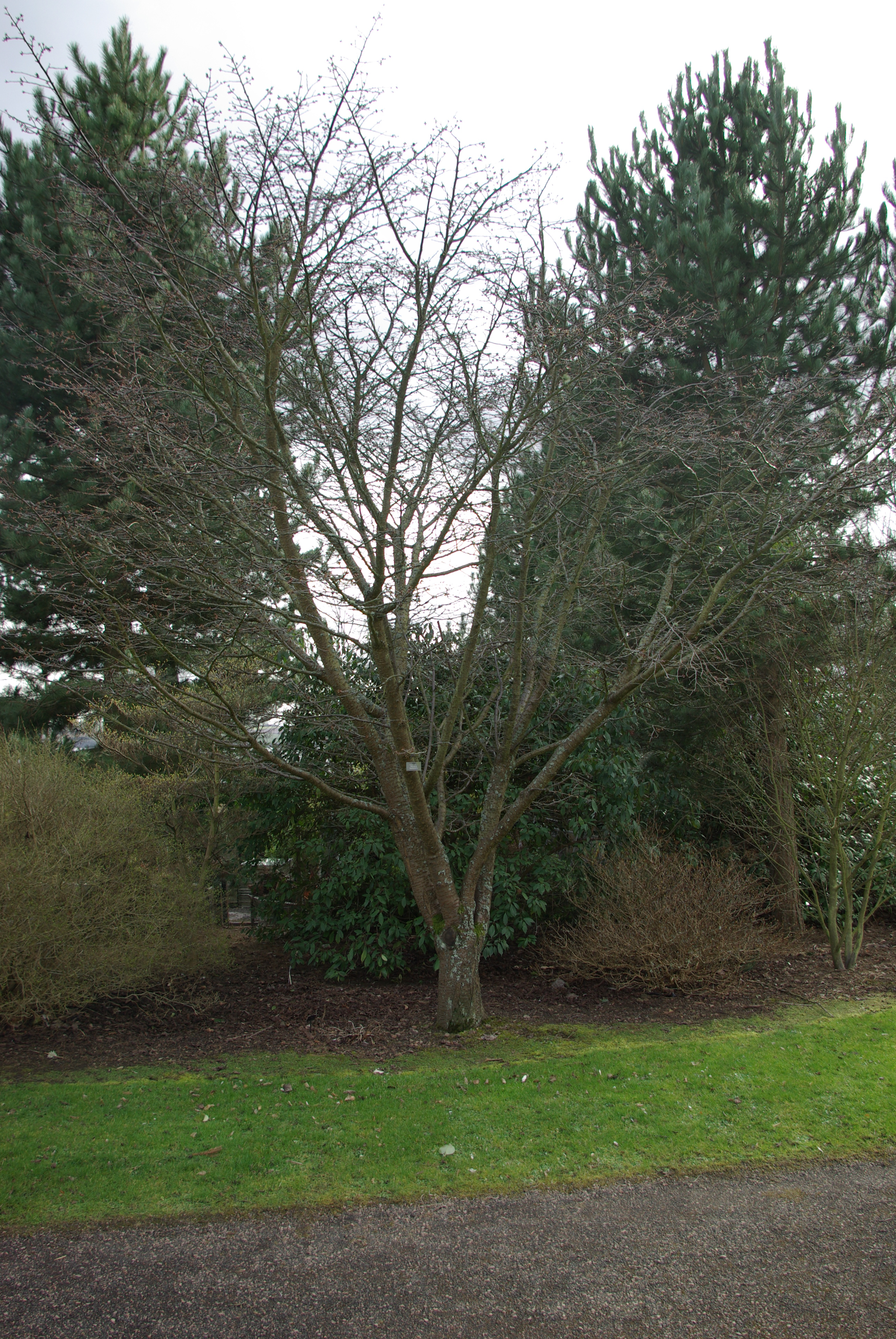 Prunus_sargentii (see also Prunus_sargentii at Wikimedia Species)